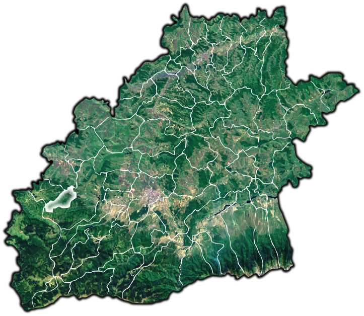 Tilisca jud Sibiu